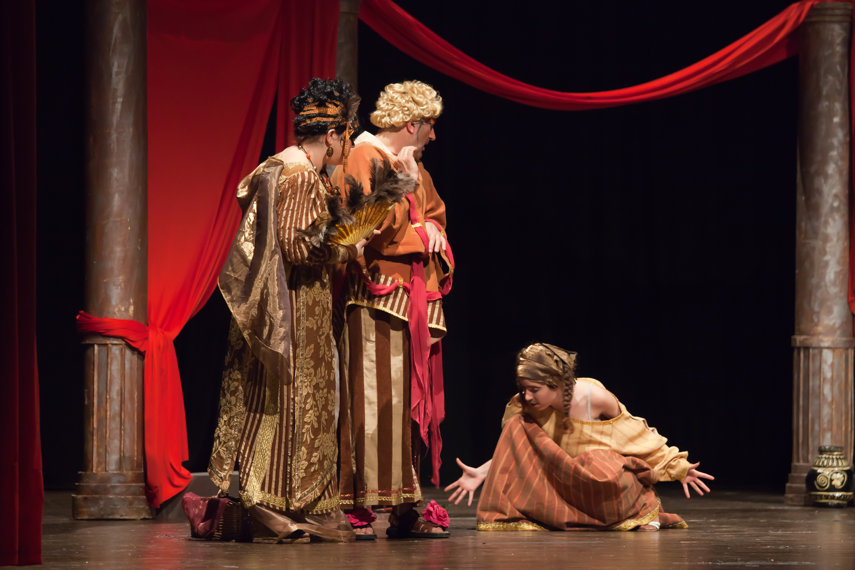 Festival de Lugo 2011 organizado por SEECGalicia. Grupo S.V. Producciones de Madrid, dirixido por Susana Verdú. © Dominio público sen restricións (Autor: Luis Miguel Bugallo Sánchez)